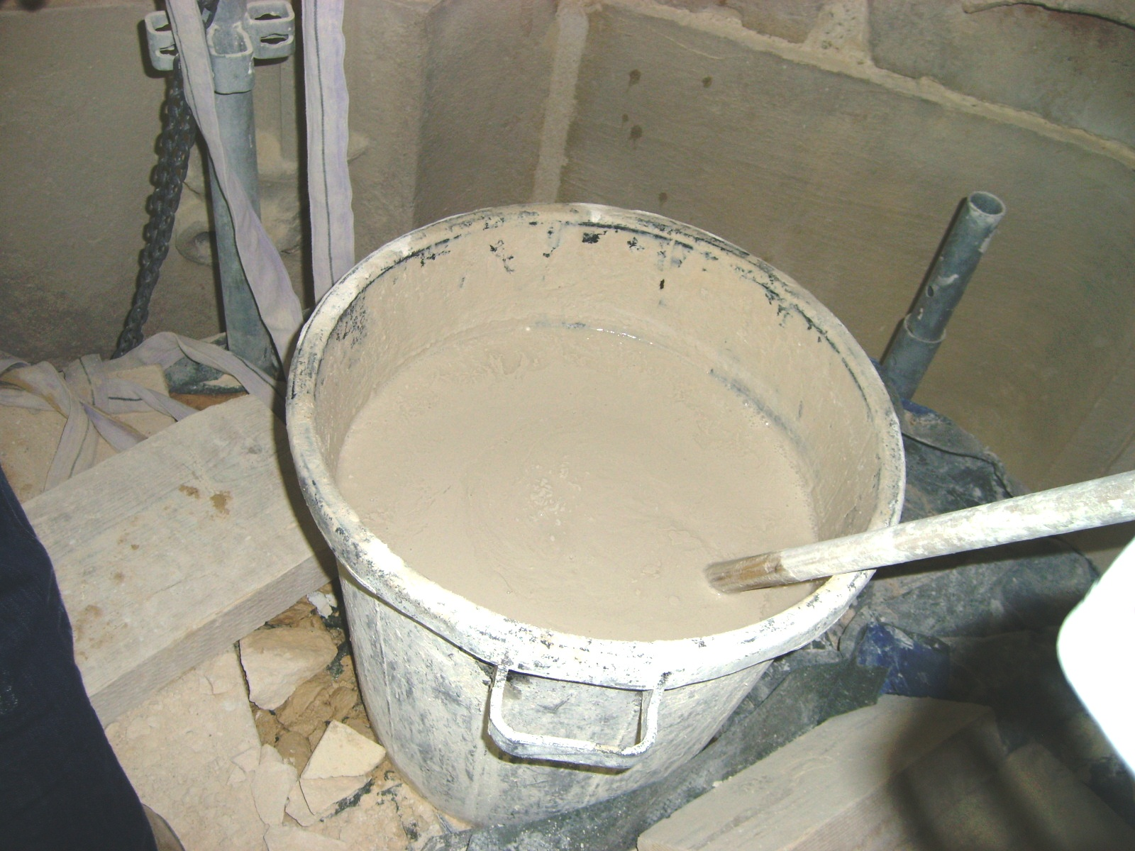 Bac contenant de la chaux hydraulique naturelle pour la maçonnerie de pierres de taille. Chantier de la Tour Saint-Jacques à Paris.